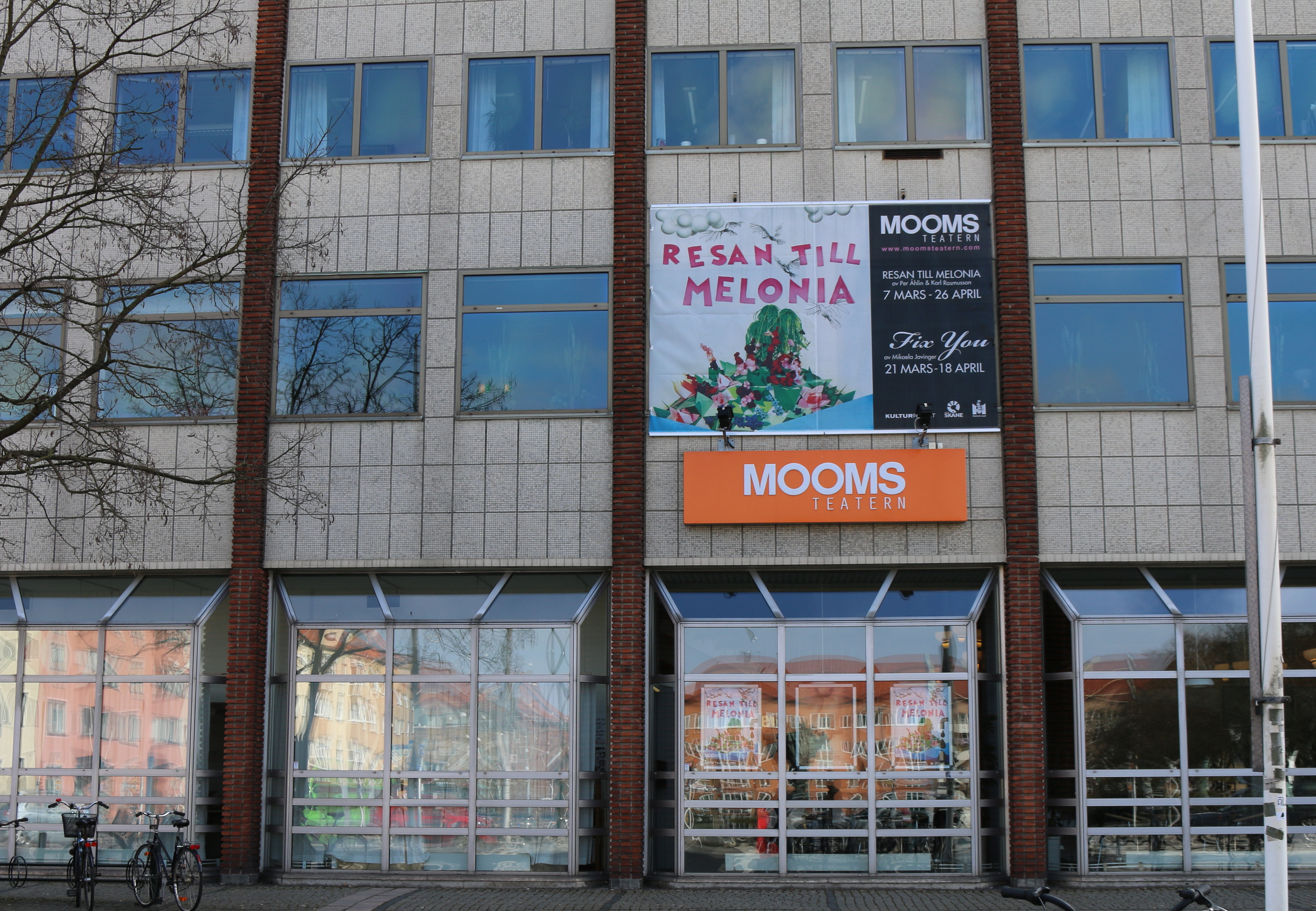 Moomsteatern, en del av Folkets Hus i Malmö 2015